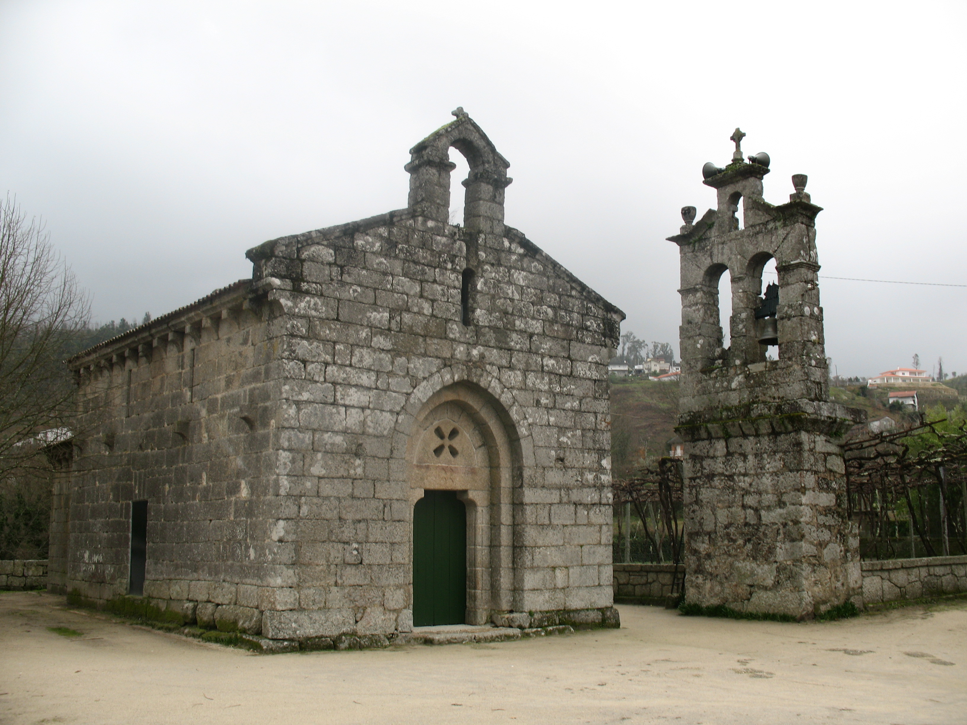 Amarante Igreja Românica de Jazente